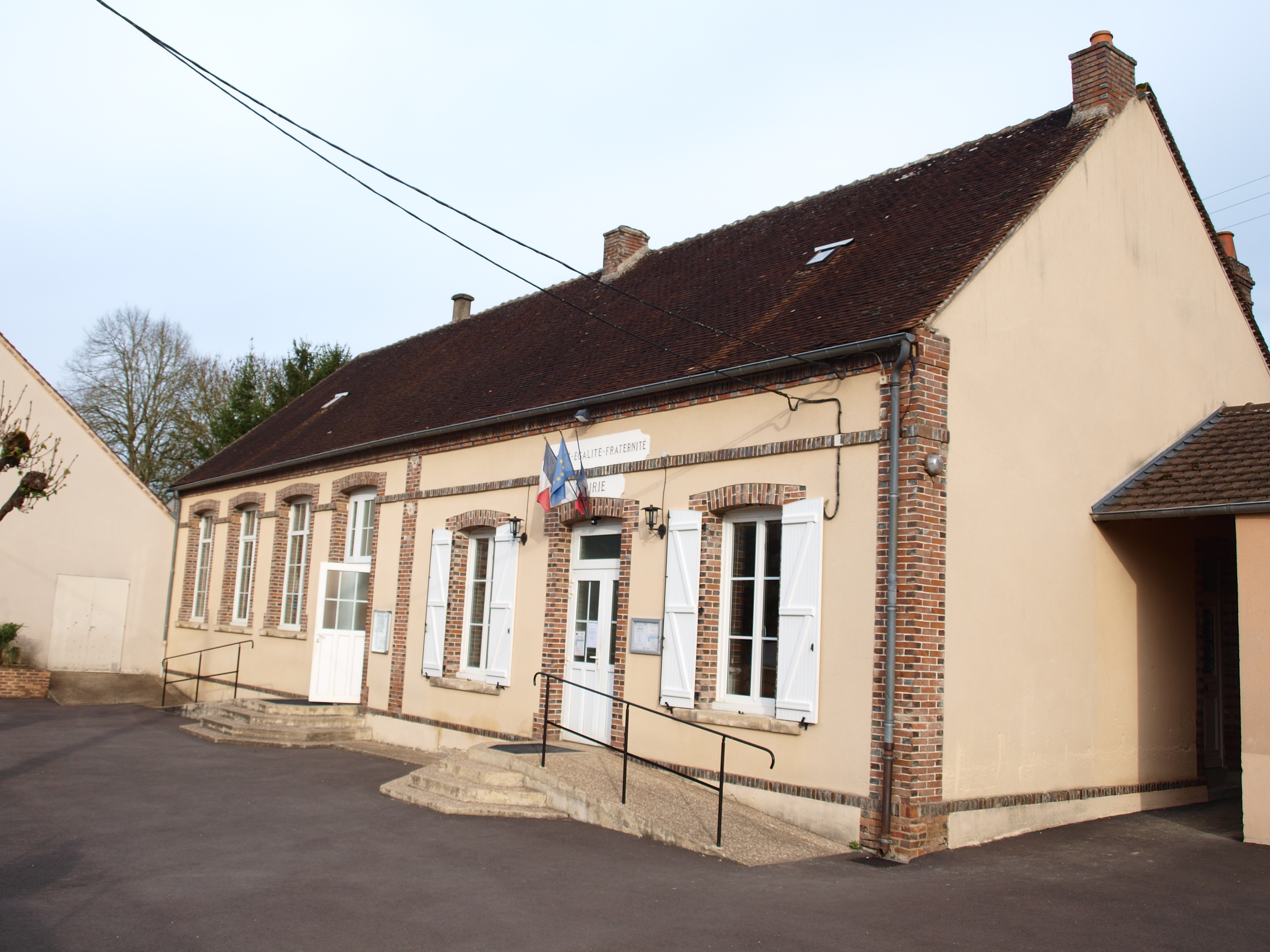 Mairie-école de Verlin (Yonne, France)